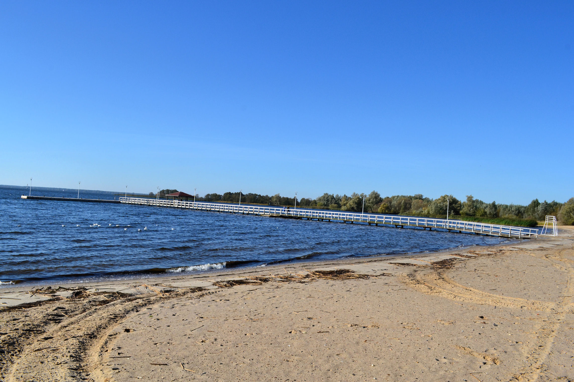 Stepnica